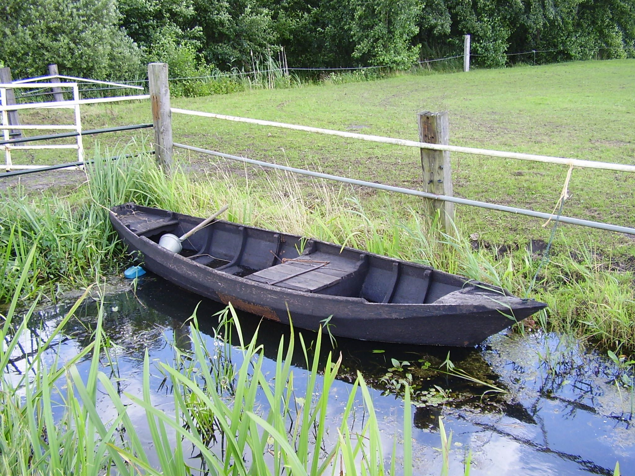 Roeiboot met bun voor visserij. De bun dient om de vissen levend te bewaren